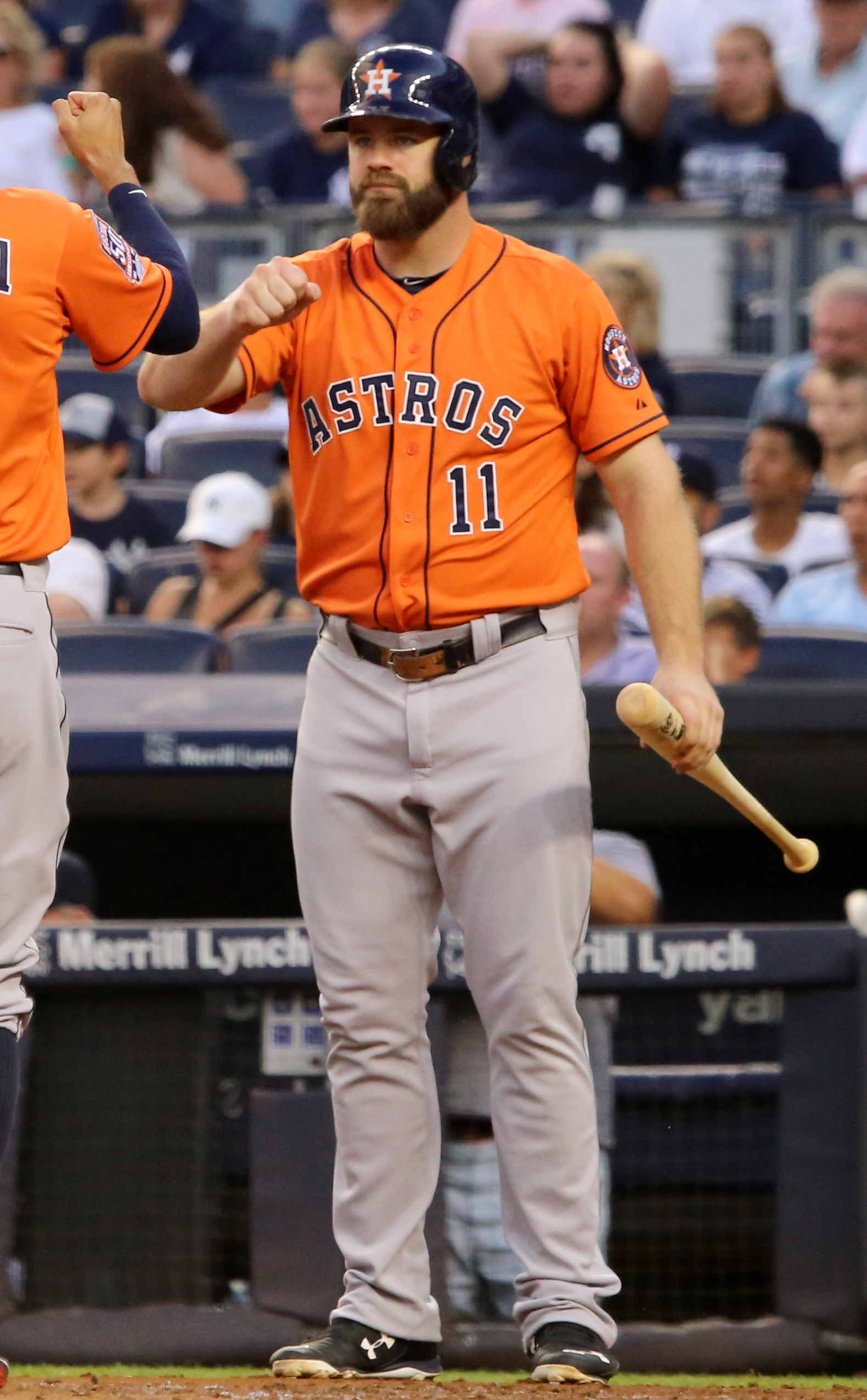 Evan Gattis